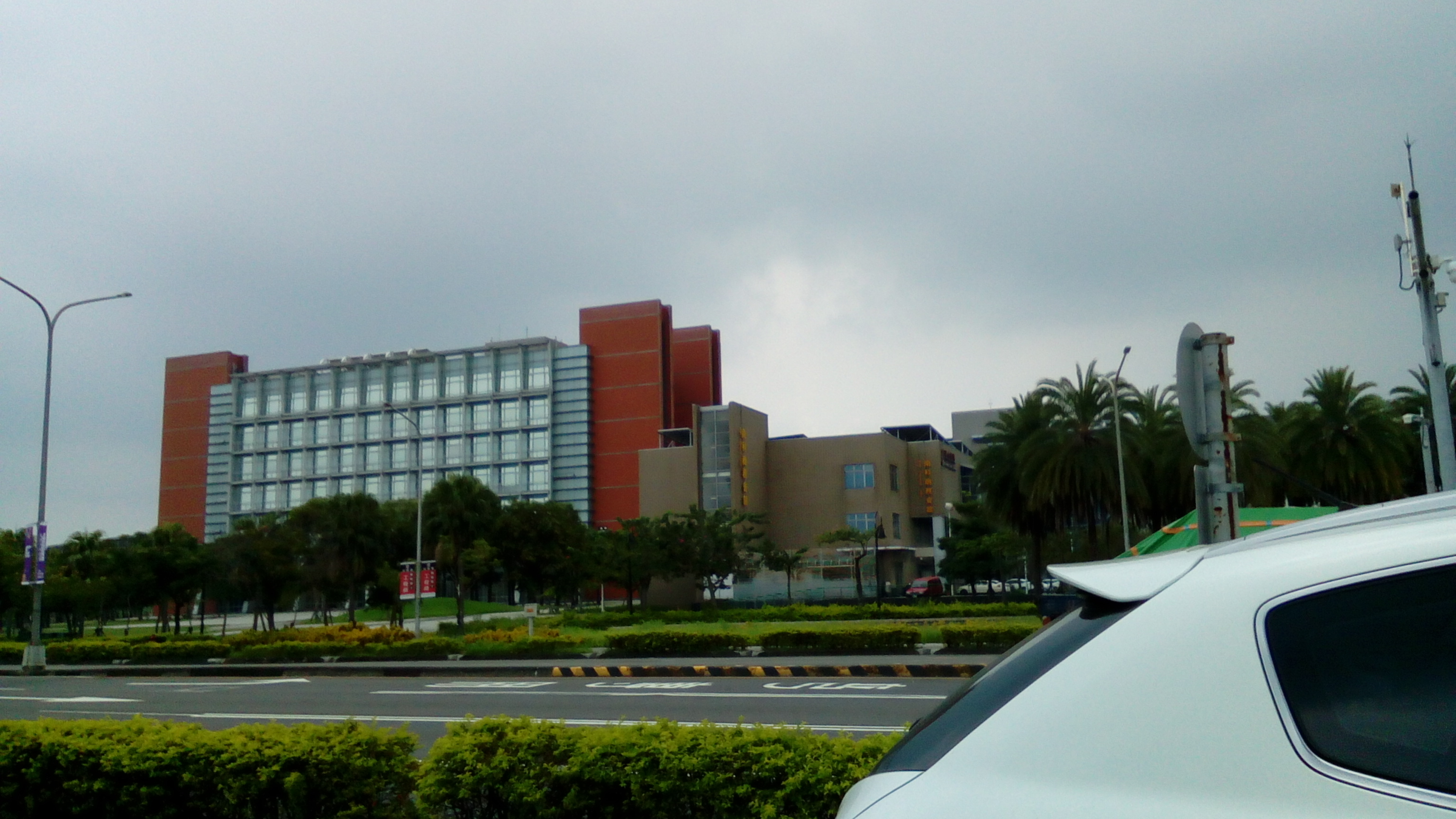 台南科學園區 南科南路與西拉雅大道口